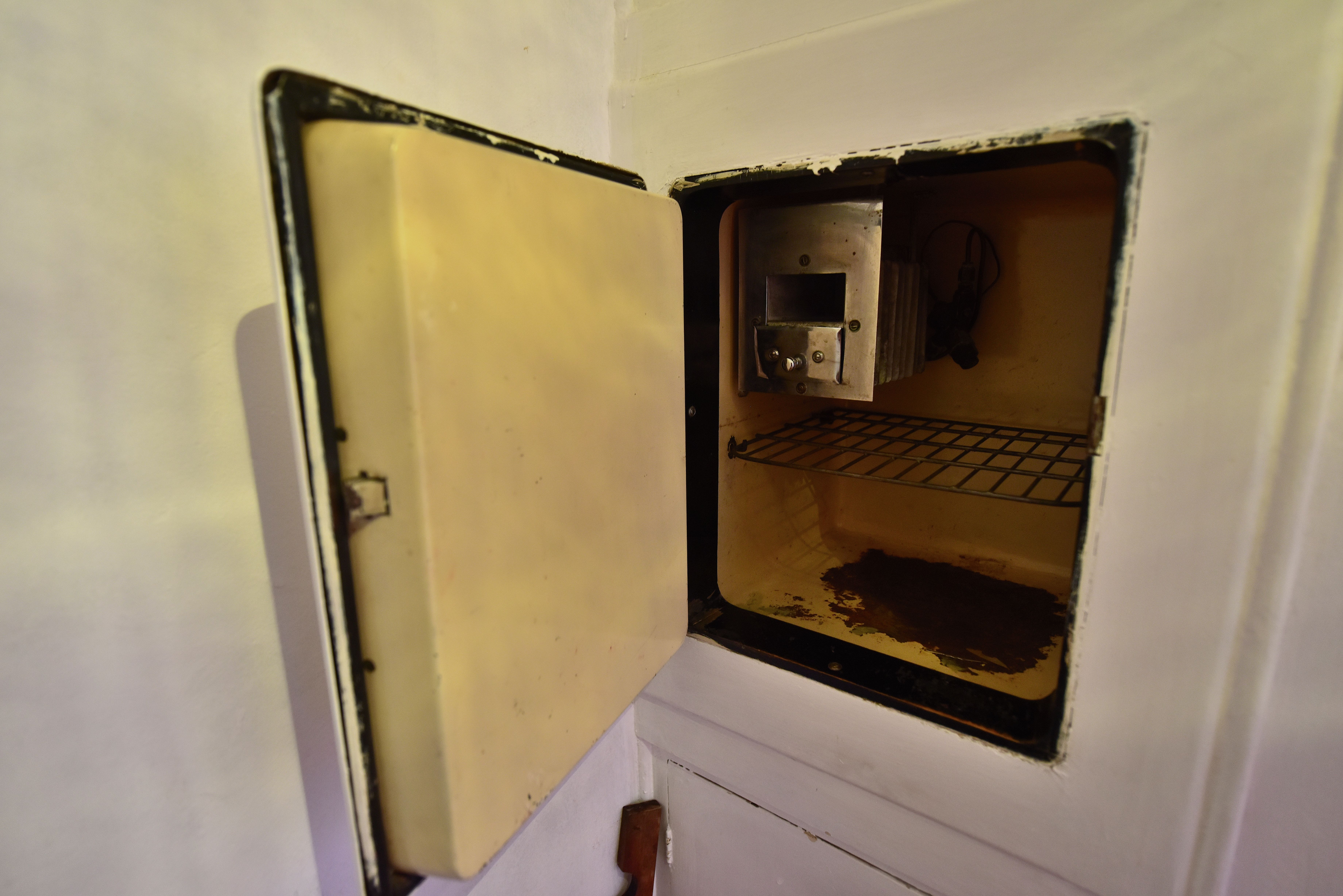 Przedwojenna lodówka freonowa w bloku BGK przy ul. Fabrycznej 27 w Warszawie